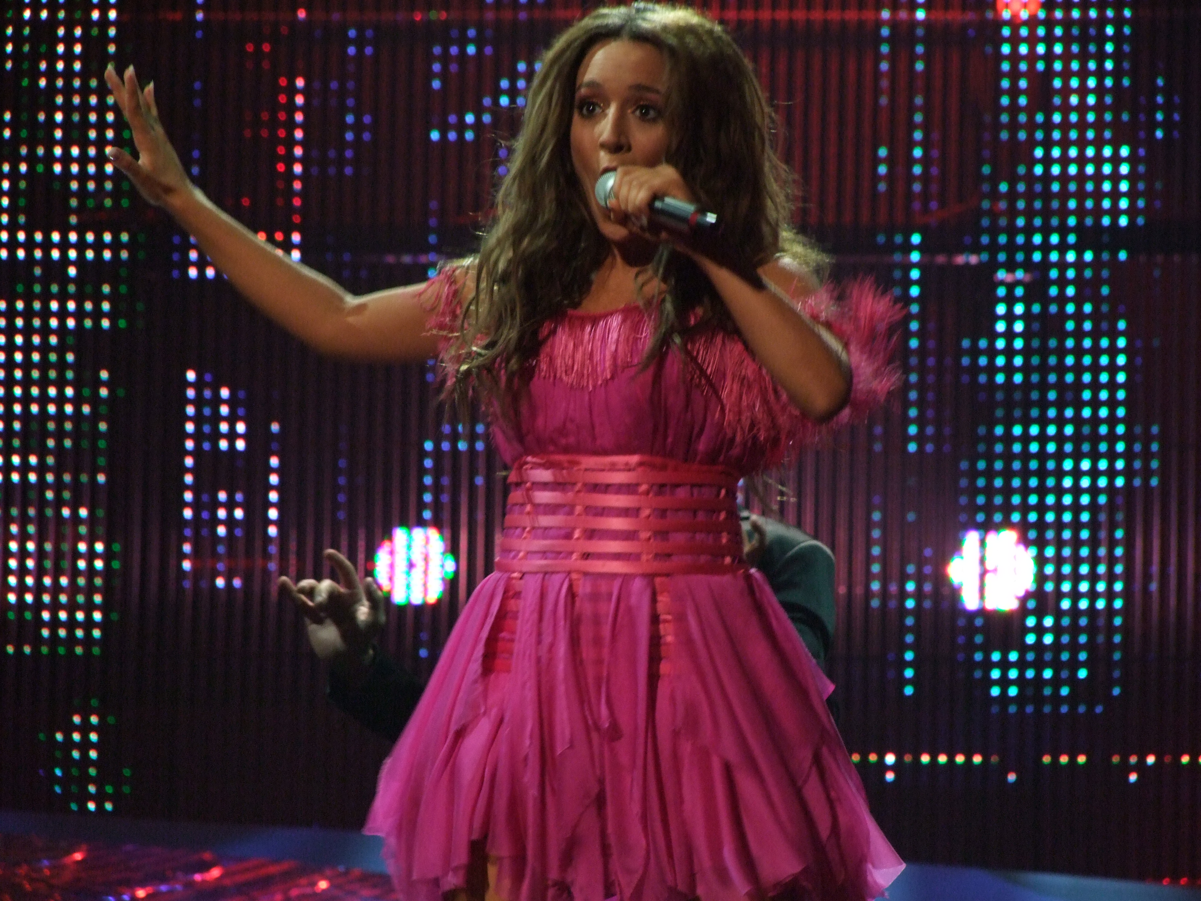 Semifinal 1 EUROVISION 2008